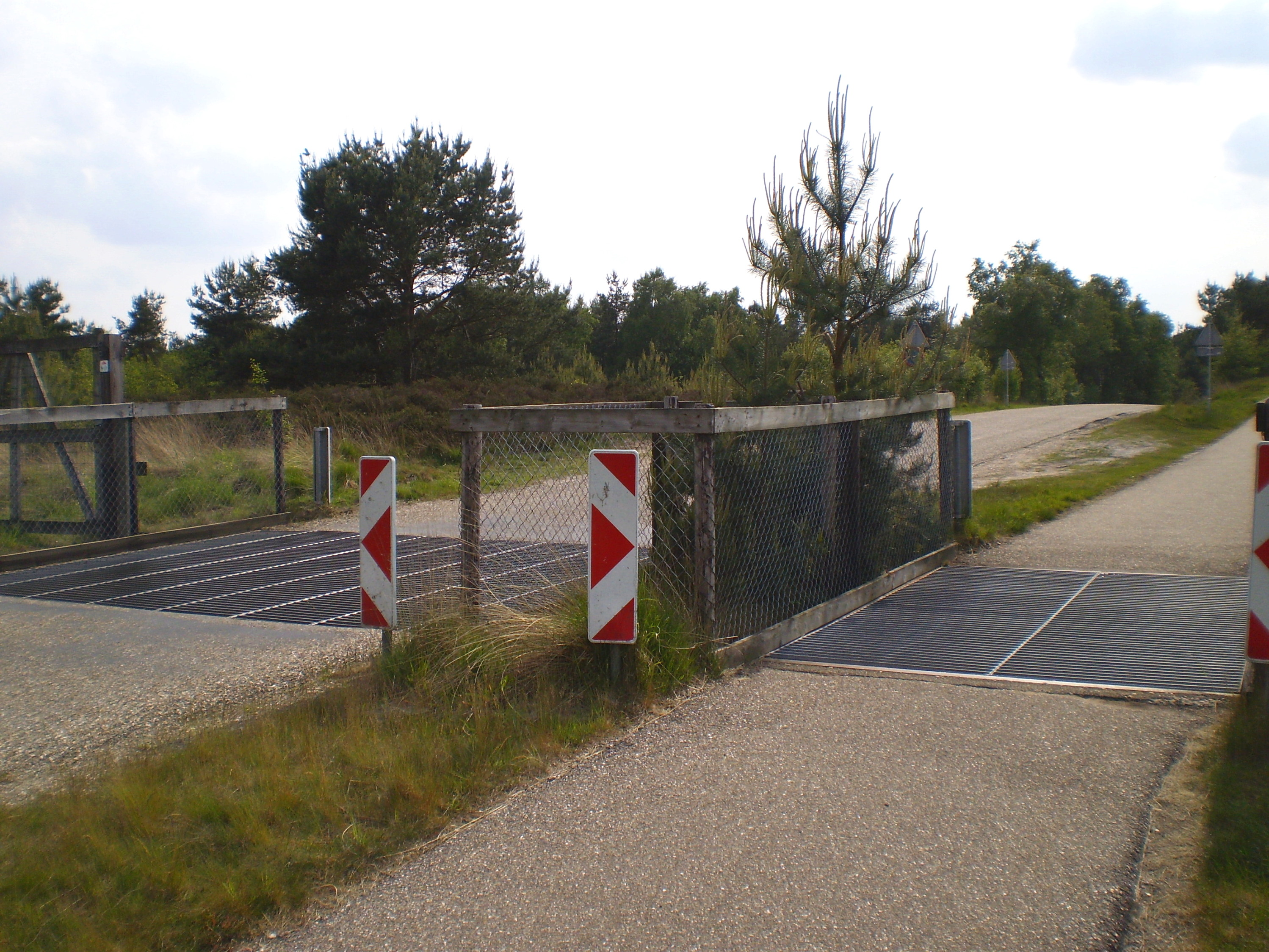 Wildrooster (Assel-Hoog Soeren)